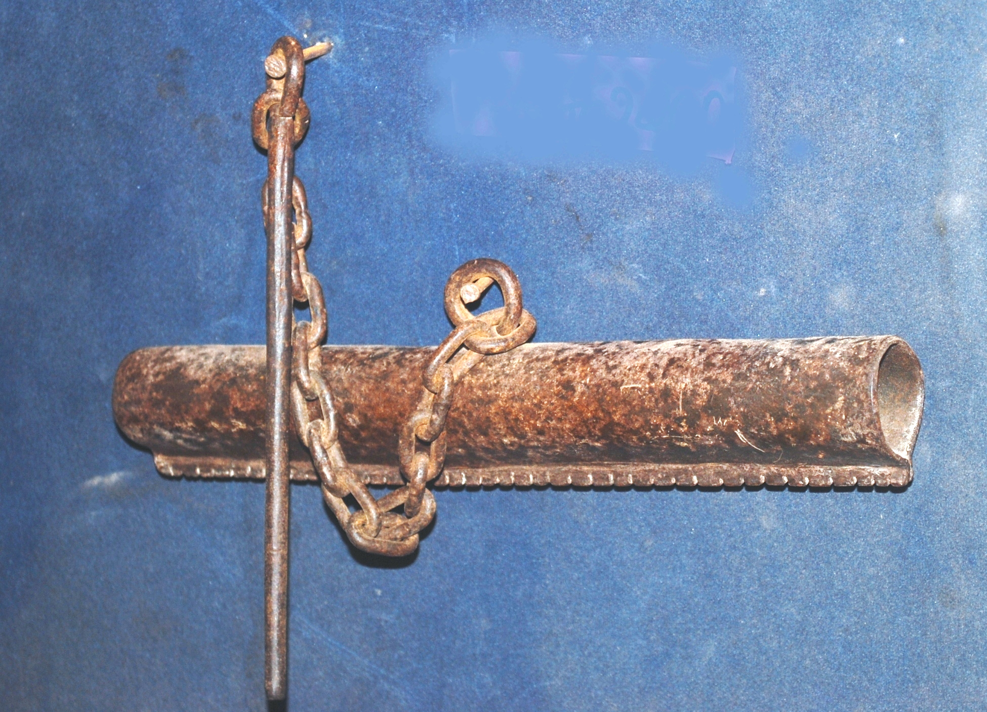 കൊക്കറ എന്ന സംഗീത ഉപകരണം